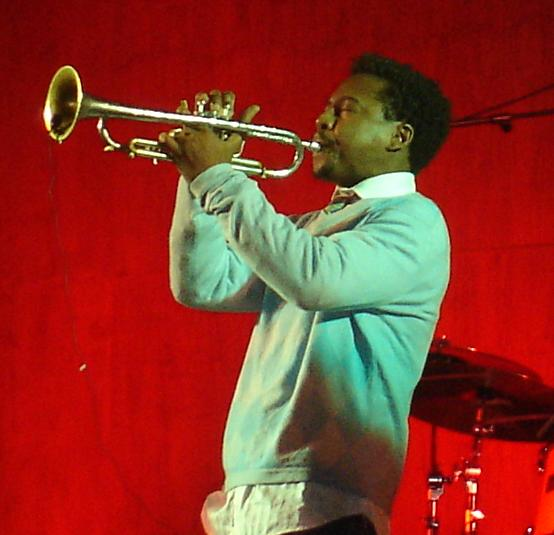 Actuación de The RH Factor en Jaén